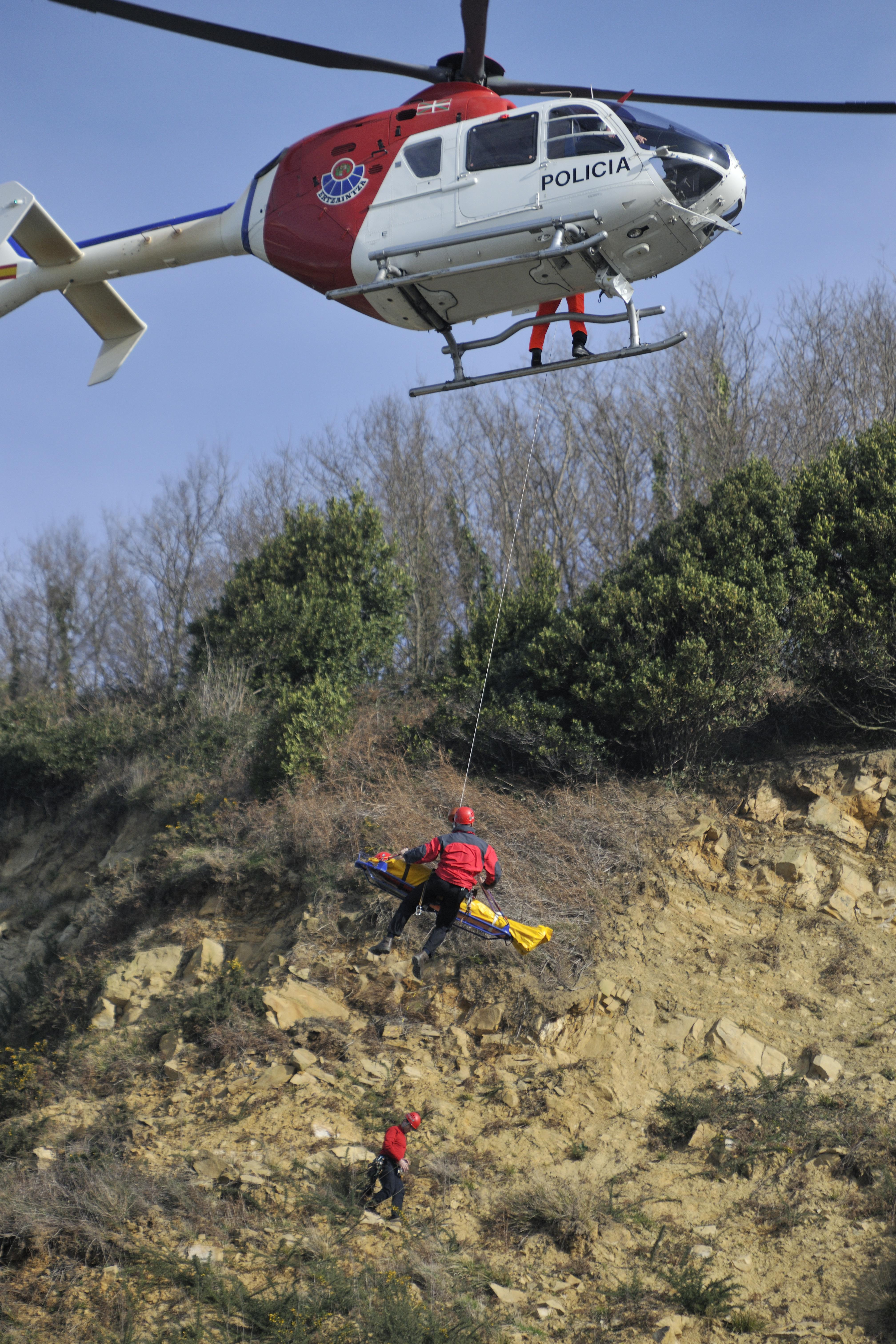 EC-GNA